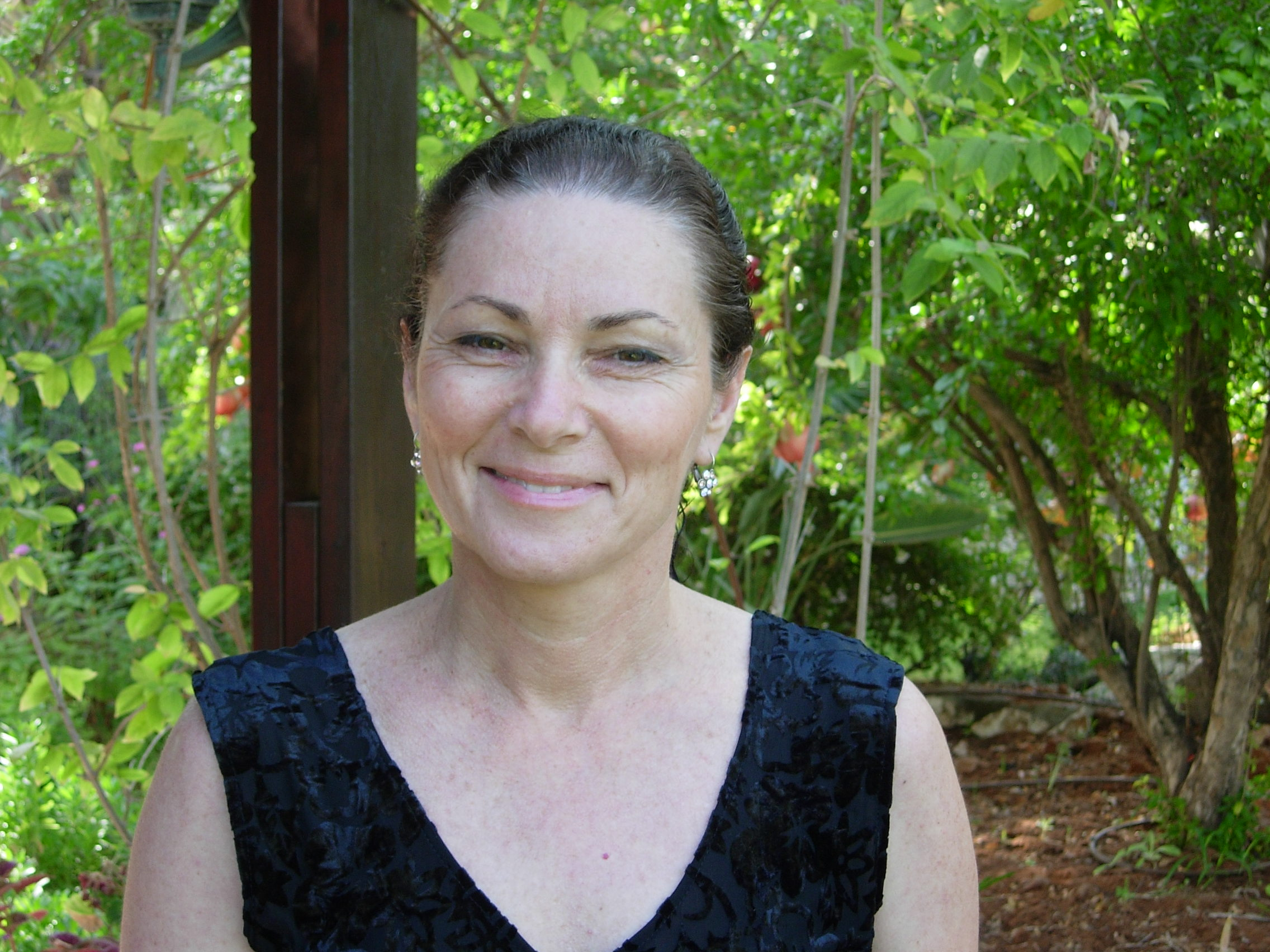 ענת ברנע